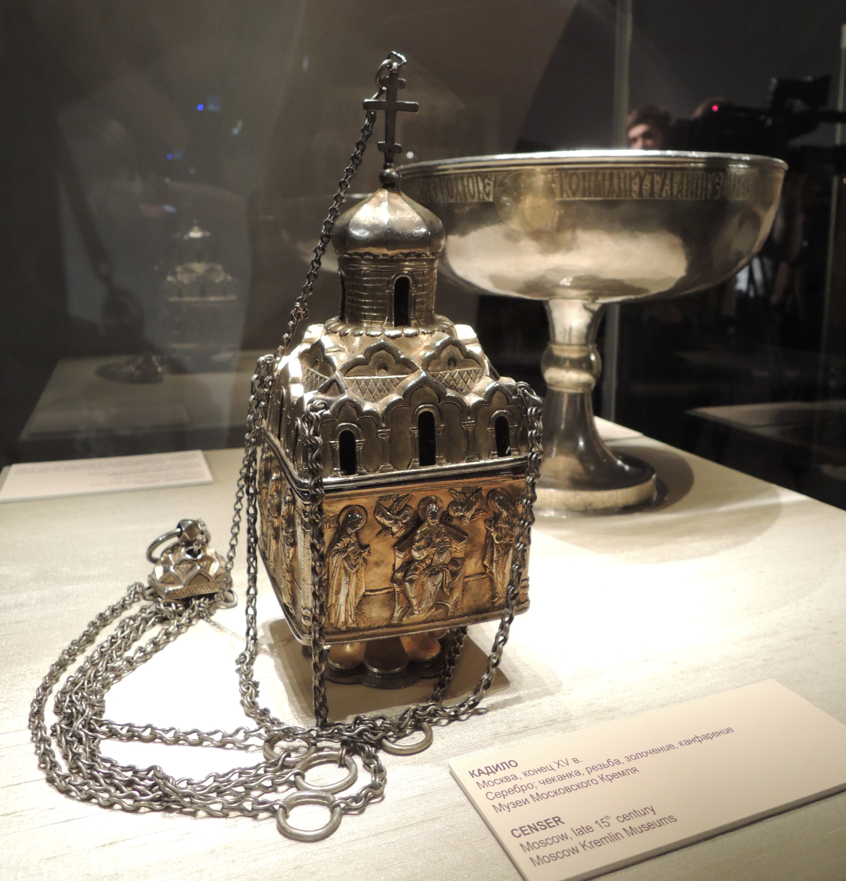 Кадило. Москва,конец XV - начало XVI вв. Серебро. Золочение, чеканка. Высота с крестом 27.5 см. Ширина 10.5 см. Кадило серебряное, золоченое, чеканное, в виде одноглавого кубического храма с двумя рядами кокошников вверху. Происходит из кремлевского Благовещенского собора и сделано в виде характерного для московской архитектуры XV века одноглавого кубического храма с позакомарным покрытием. В то же время иконография и стиль изображений святых, чеканенных на его стенках, свидетельствуют о близком знакомстве мастера-ювелира с произведениями современных ему столичных художников и, в частности, с миниатюрами «Книги пророков», созданной в Москве в 1489 году по заказу великокняжеского дьяка Василия Мамырева.